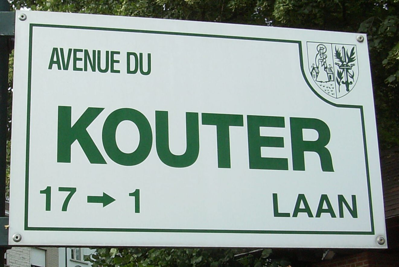 avenue du Kouter Auderghem Belgium